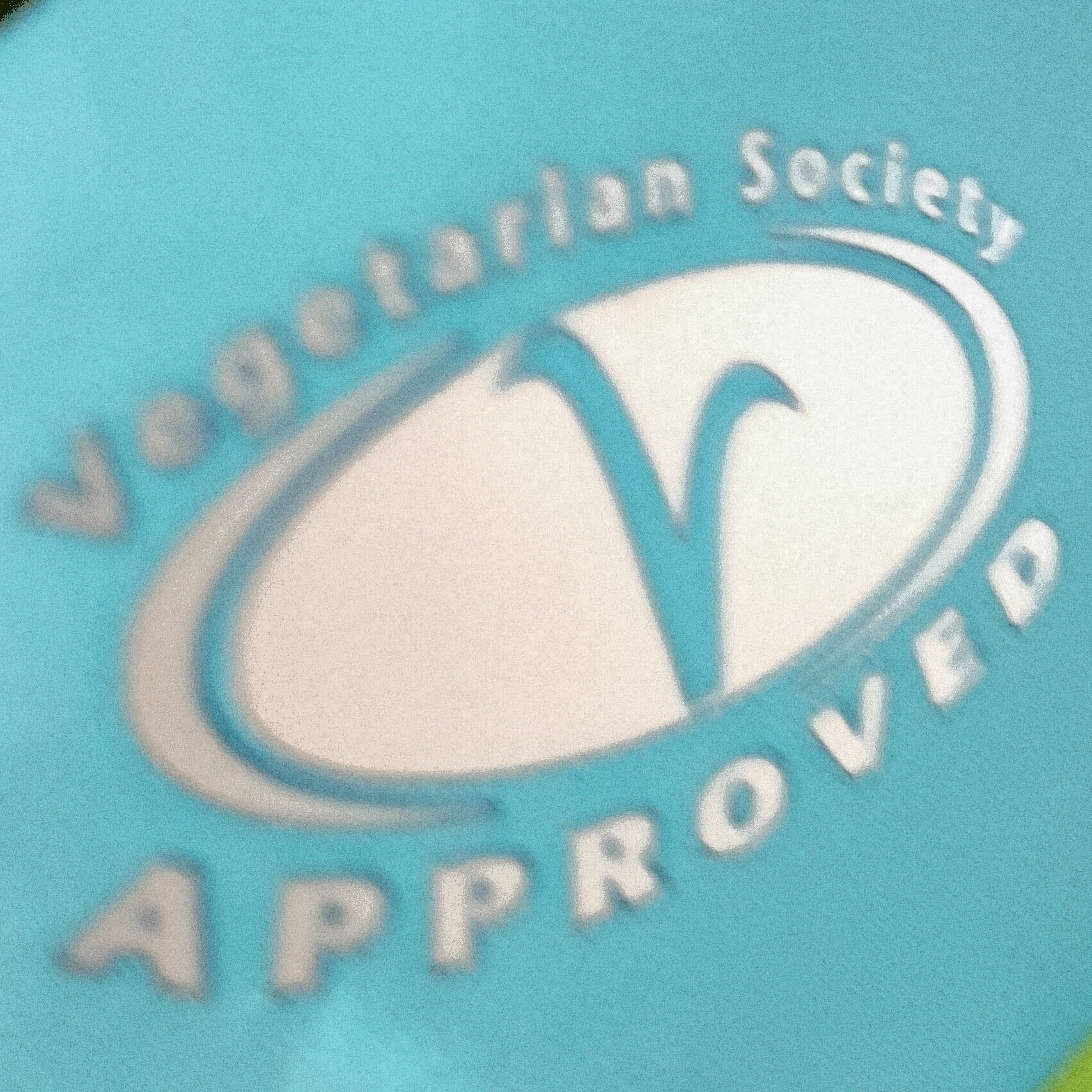 the vegetarian society's icon on dog food package.